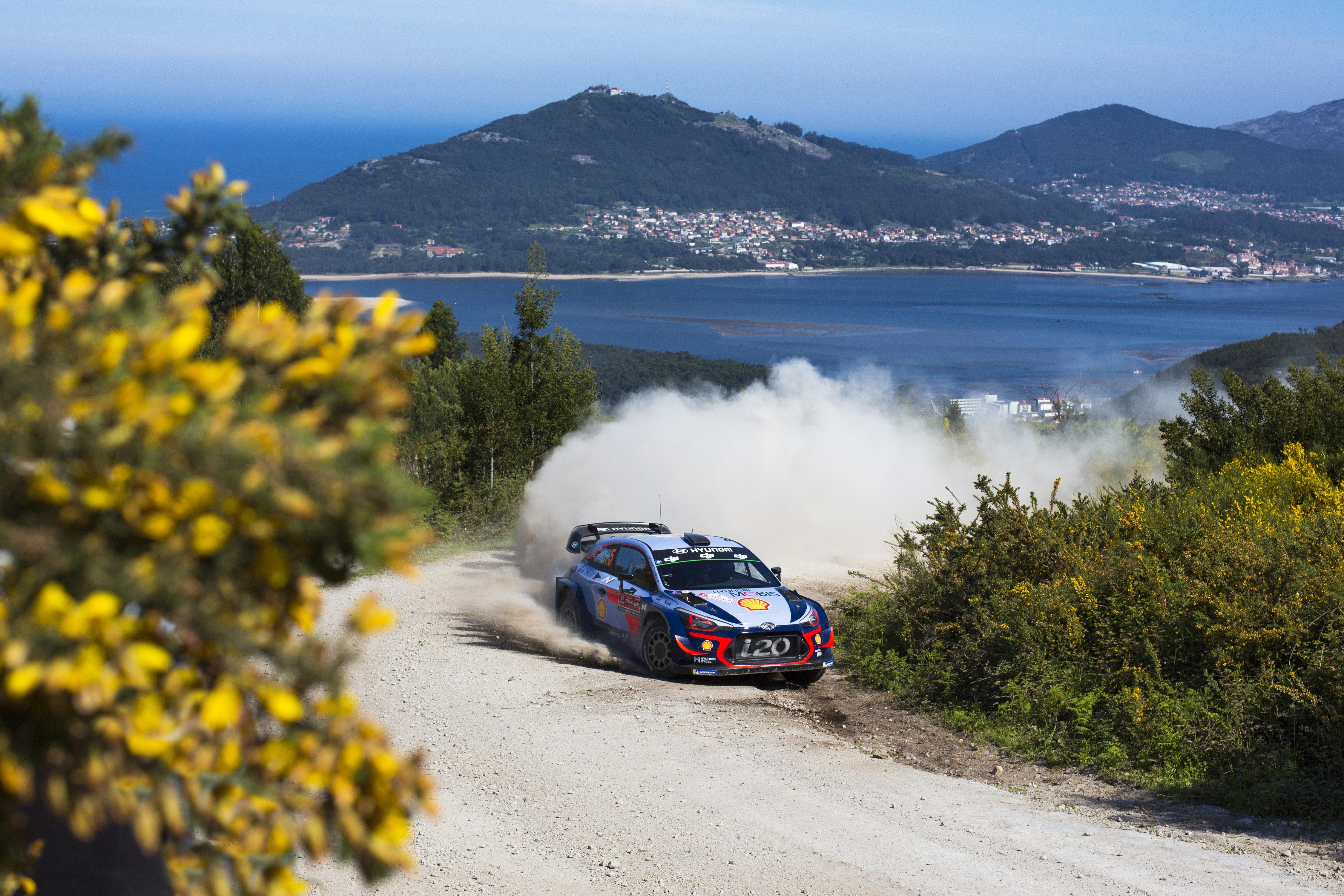 Thierry Neuville podczas Rajdu Portugalii 2018